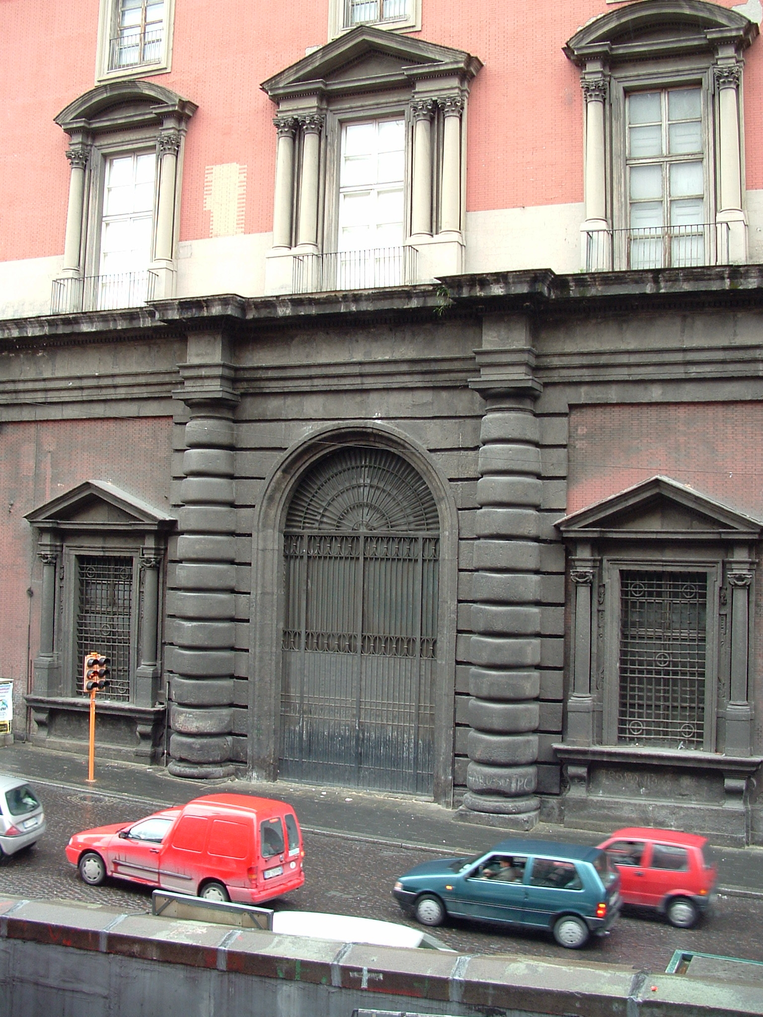 Napoli, Museo Archeologico Nazionale, lato occidentale su via Santa Teresa degli Scalzi. Ingresso originario della Cavallerizza.